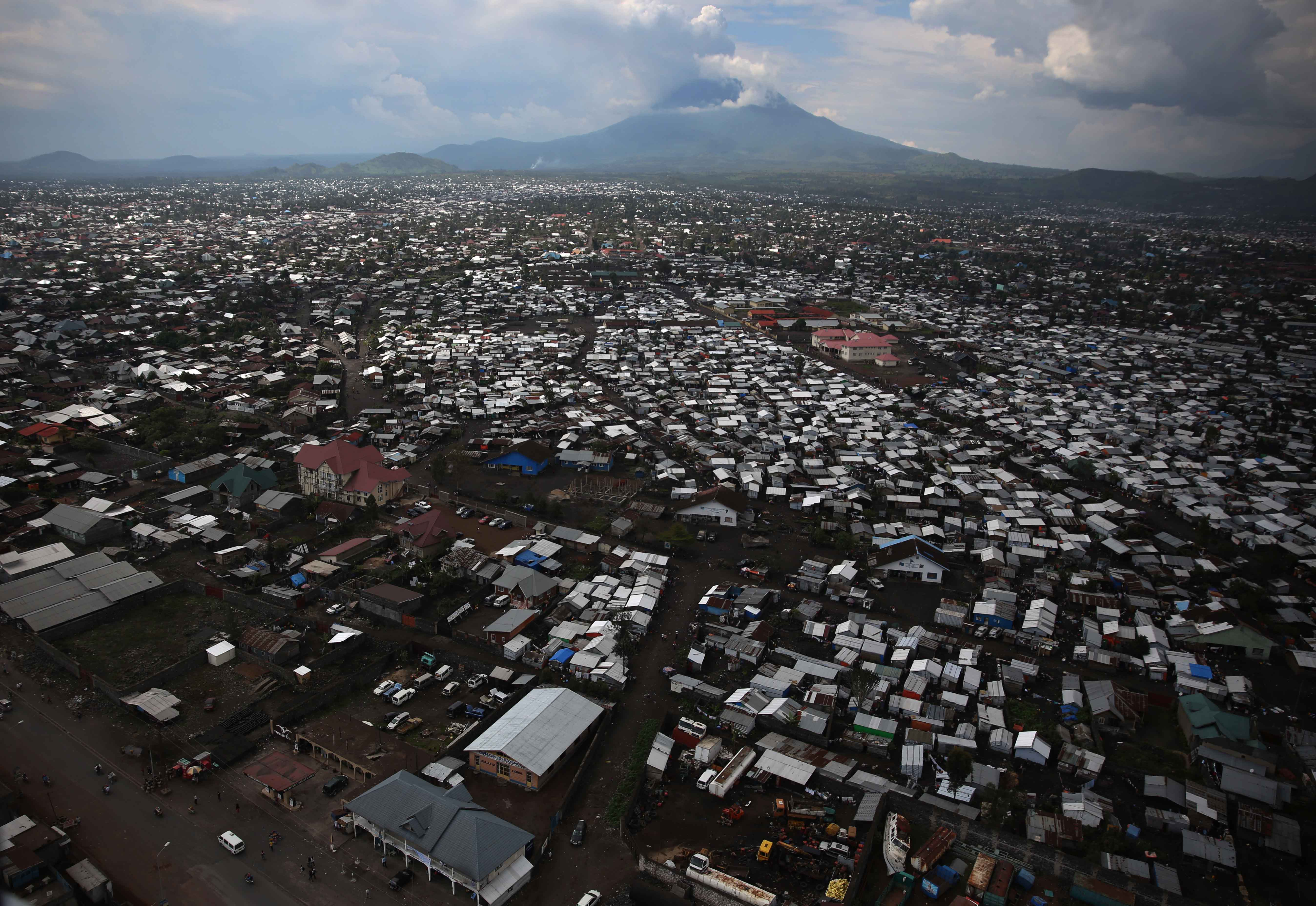 photo MONUSCO / Abel Kavanagh